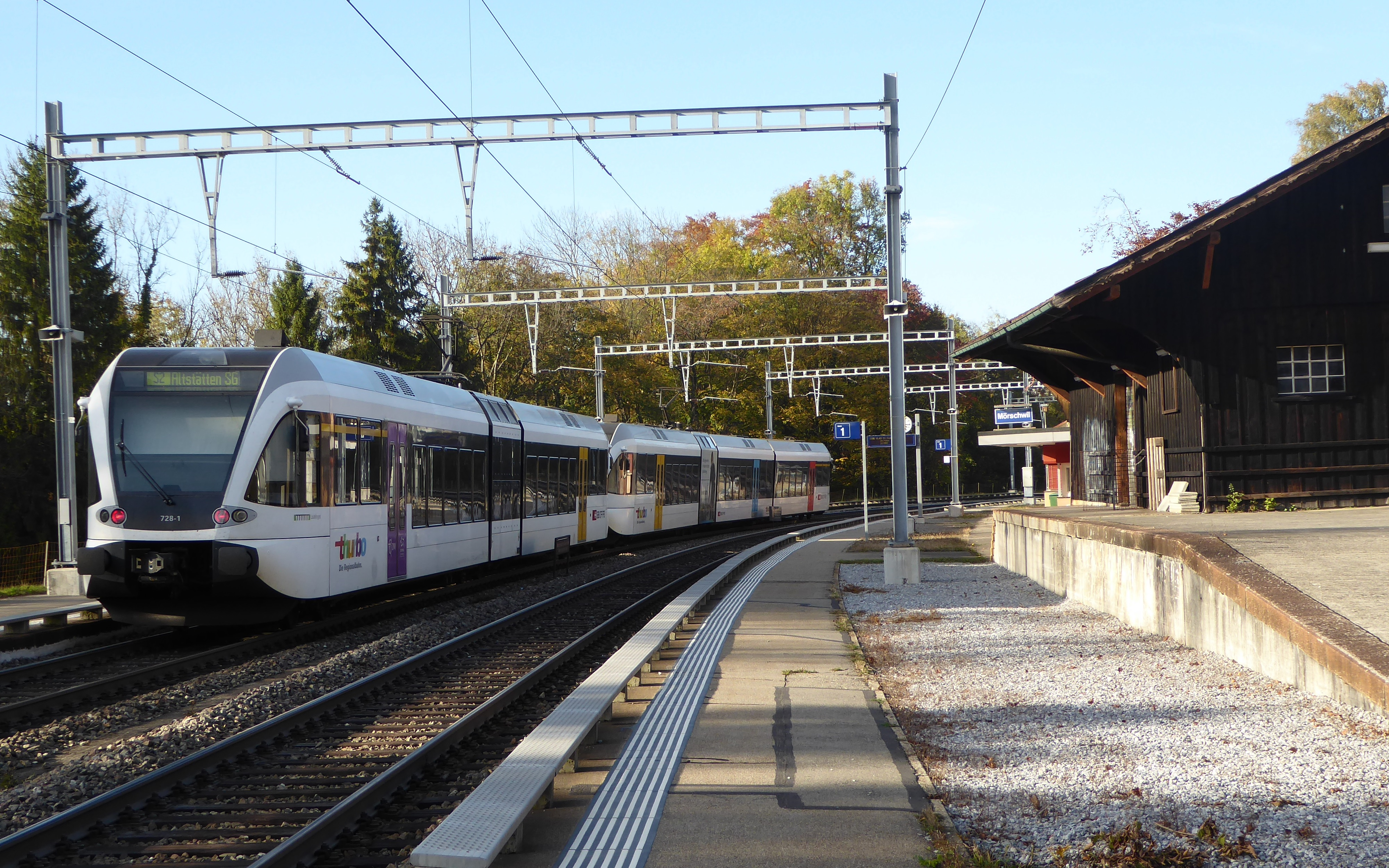 Bahnhof Mörschwil mit nach Altstätten fahrender S2 und Gütterschuppen